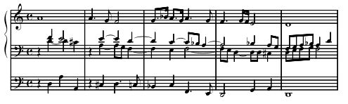 Opening bars of Buxtehude's chorale prelude Vater unser im Himmelreich, BuxWV 219